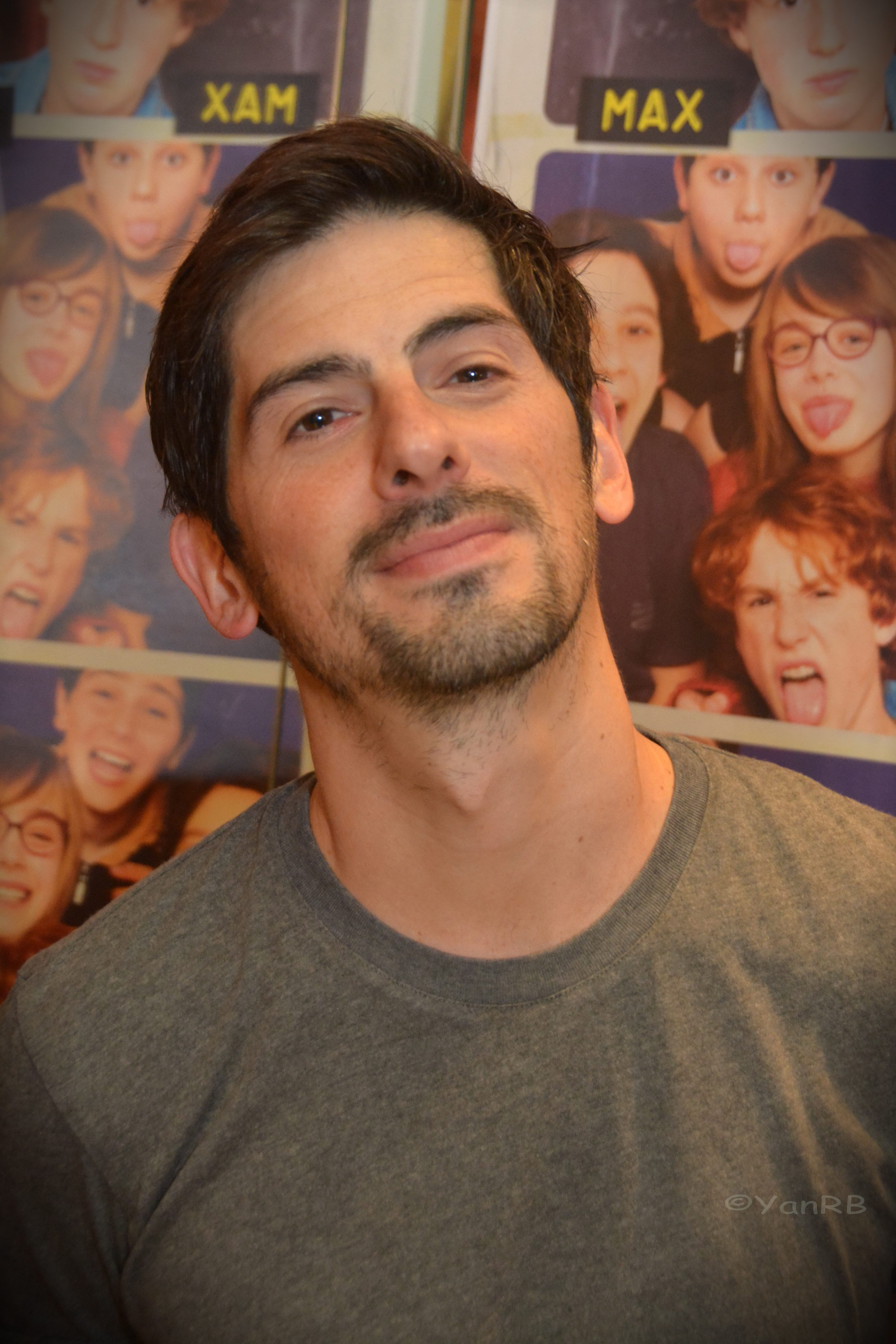 portrait